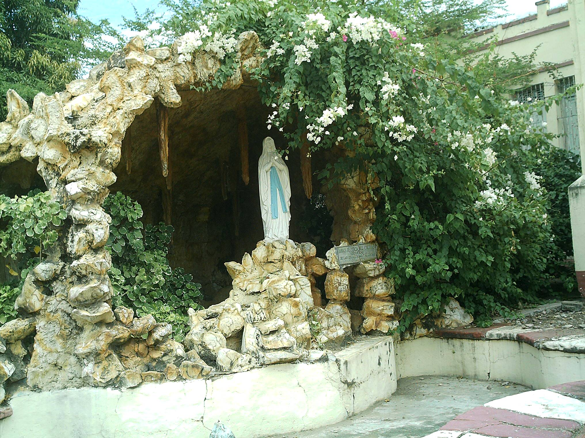 Gruta dedicada a Nuestra Señora De Lourdes,ubicada en el colegio santa teresa de jesus, en El Banco(Magdalena)